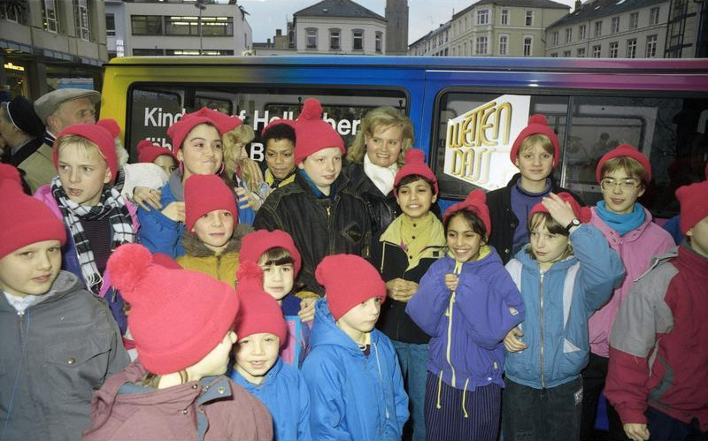 Bonn, 12.12.1989 Auf Grund einer verlorenen Wette in der Fernsehsendung "Wetten, daß..." fährt Hannelore Kohl Jungen und Mädchen aus dem Kinderdorf Hollenberg nach Bonn zu einem Besuch des Weihnachtsmarktes auf dem Münsterplatz.